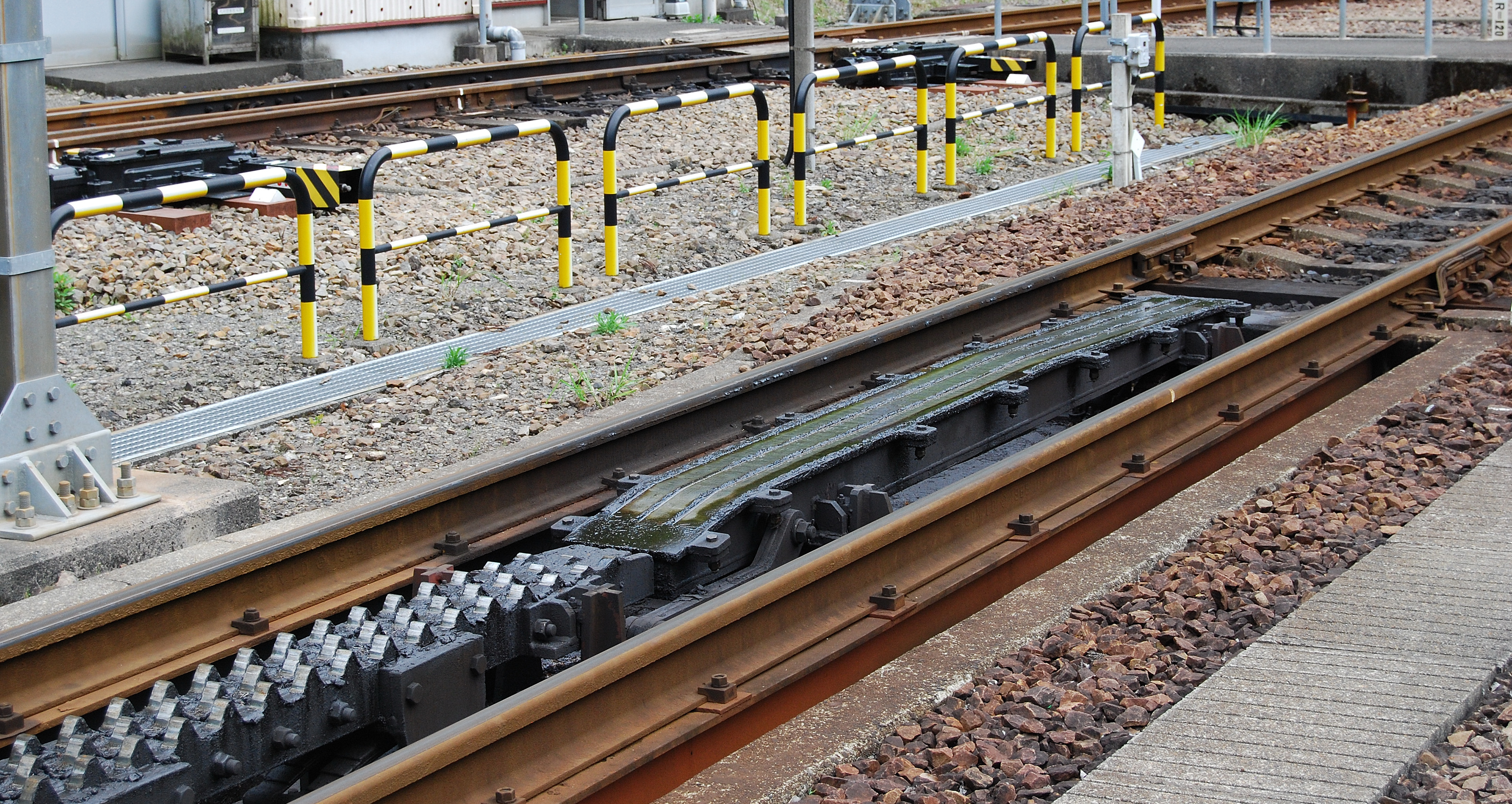 大井川鐵道井川線アプトいちしろ駅にあるラックレールのエントランス部分。